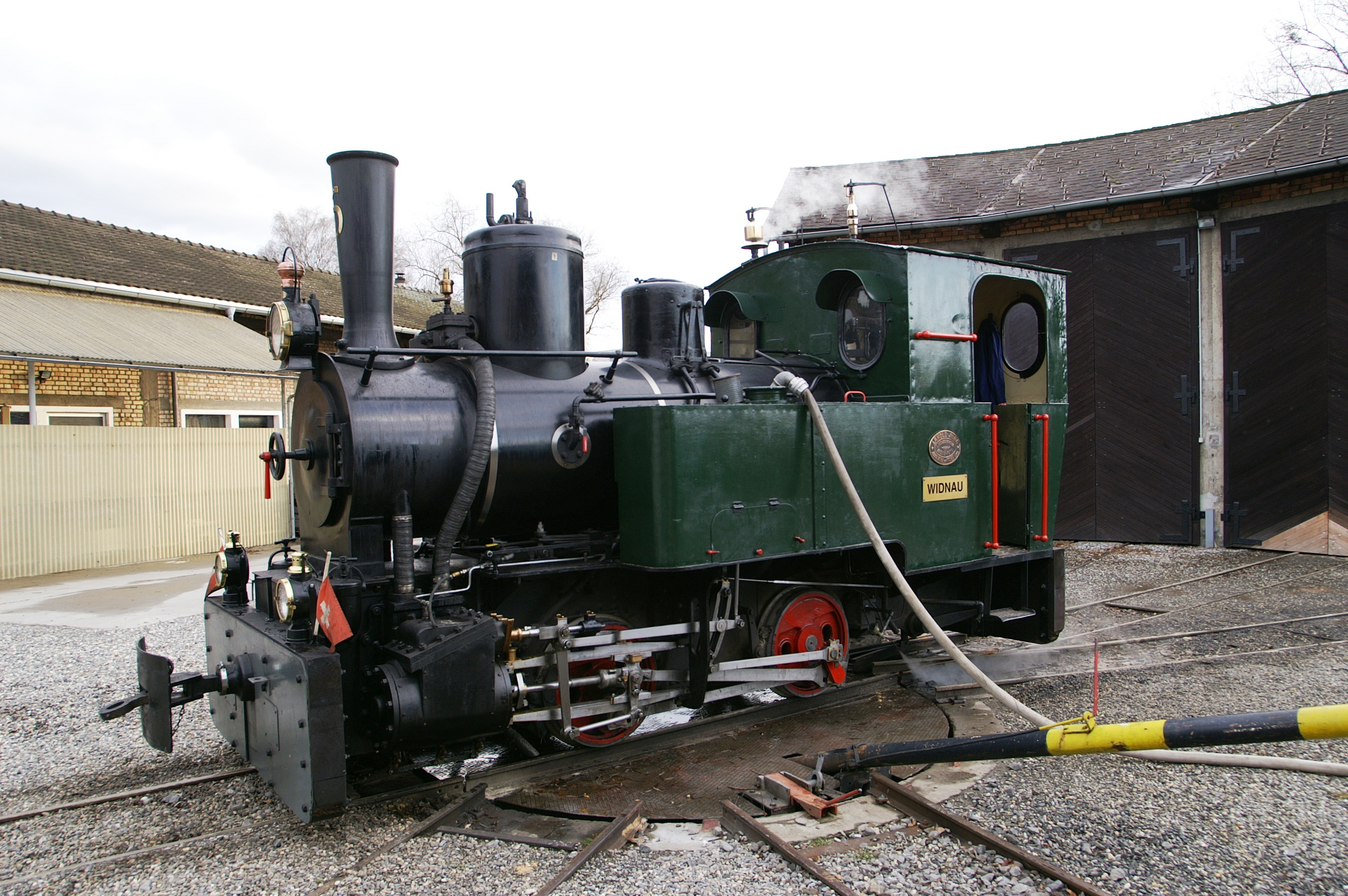 Arnold Jung Lokomotivfabrik Dampflok im Dienste der Internationalen Rheinregulierung, stationiert in Lustenau, vor der Remise auf einem s.g. Drehkreuz